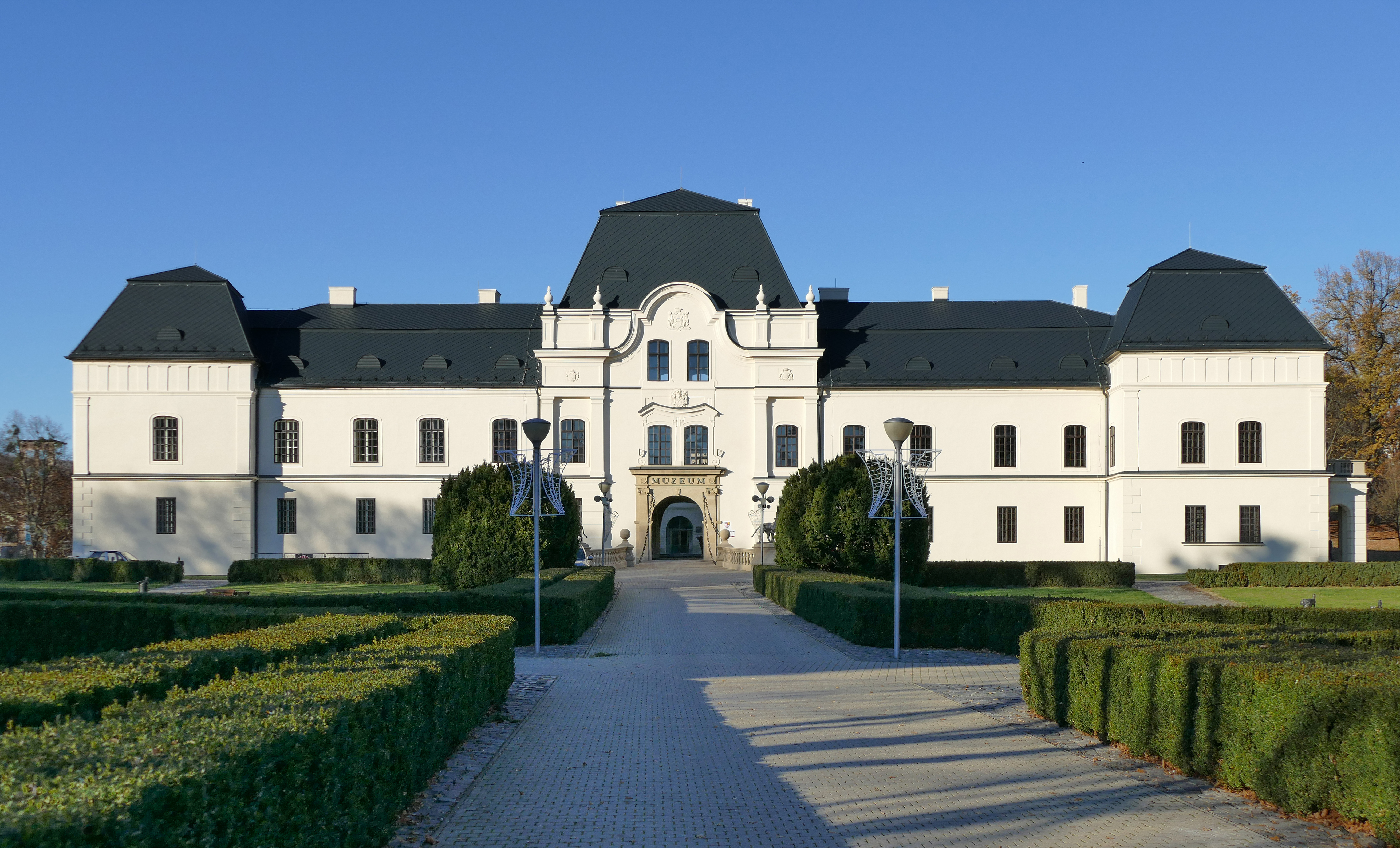 Humenský zámok (Kaštieľ v Humennom), v budove renesančného zámku sídli Vihorlatské múzeum